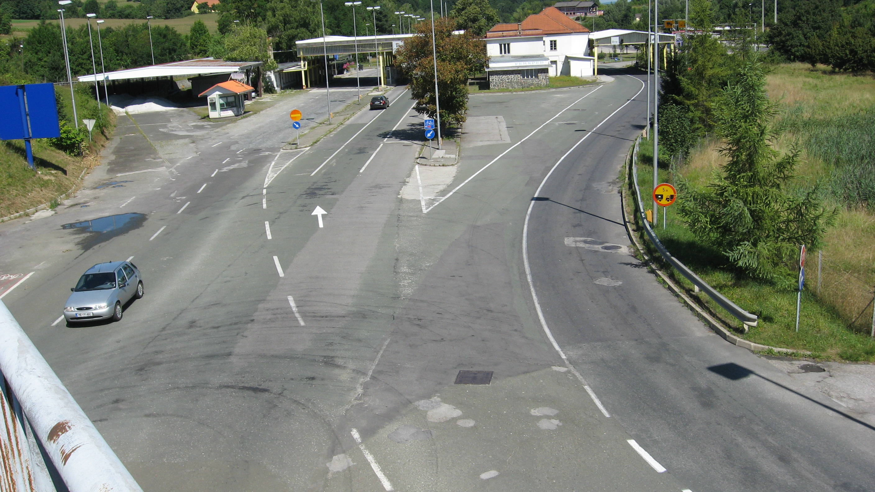 MMP Šentilj (stari) na regionalni cesti - pogled s kamionske ceste